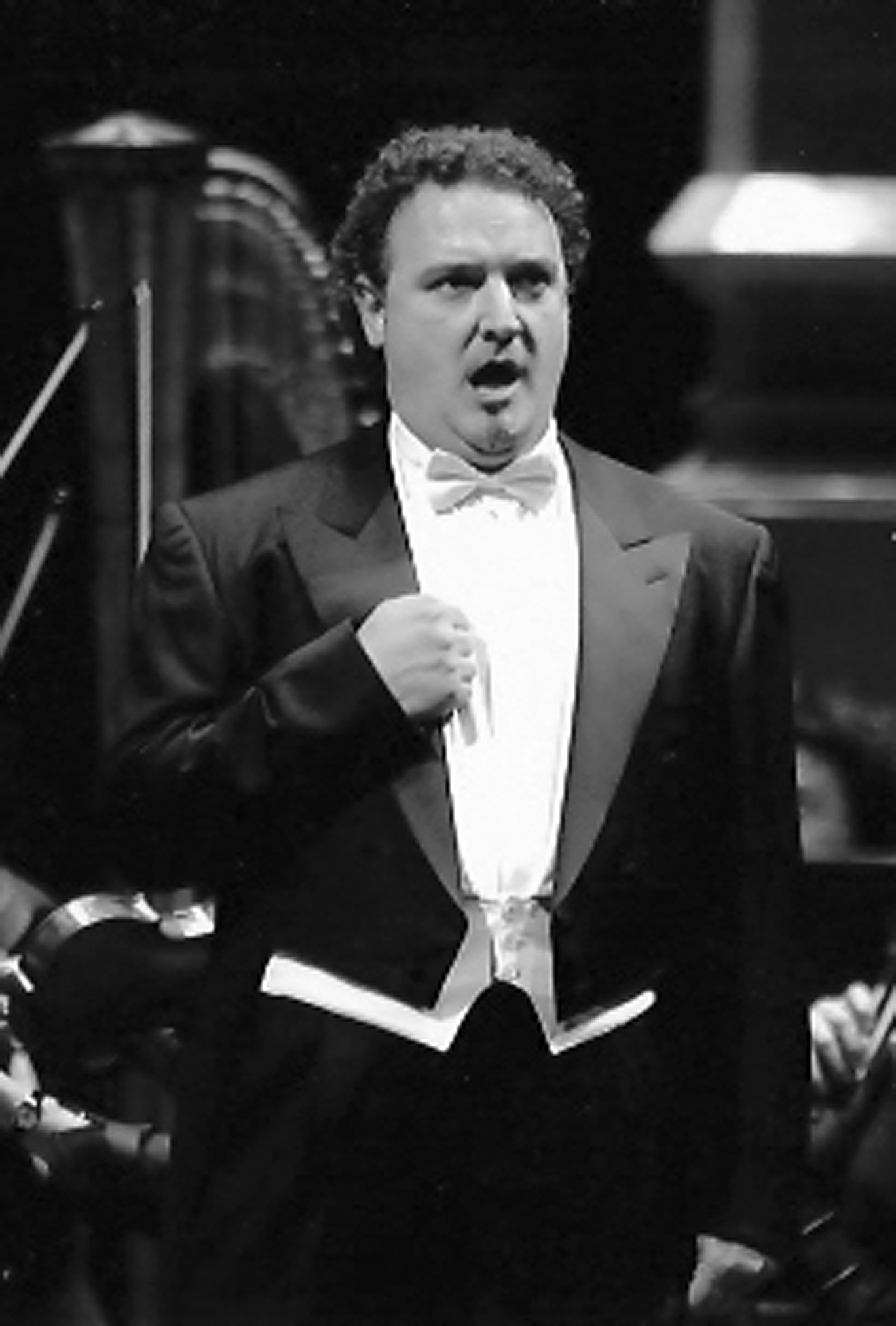 Josep Fadó Bruguet (Mataró, 11 de desembre de ?) és un tenor líric català.